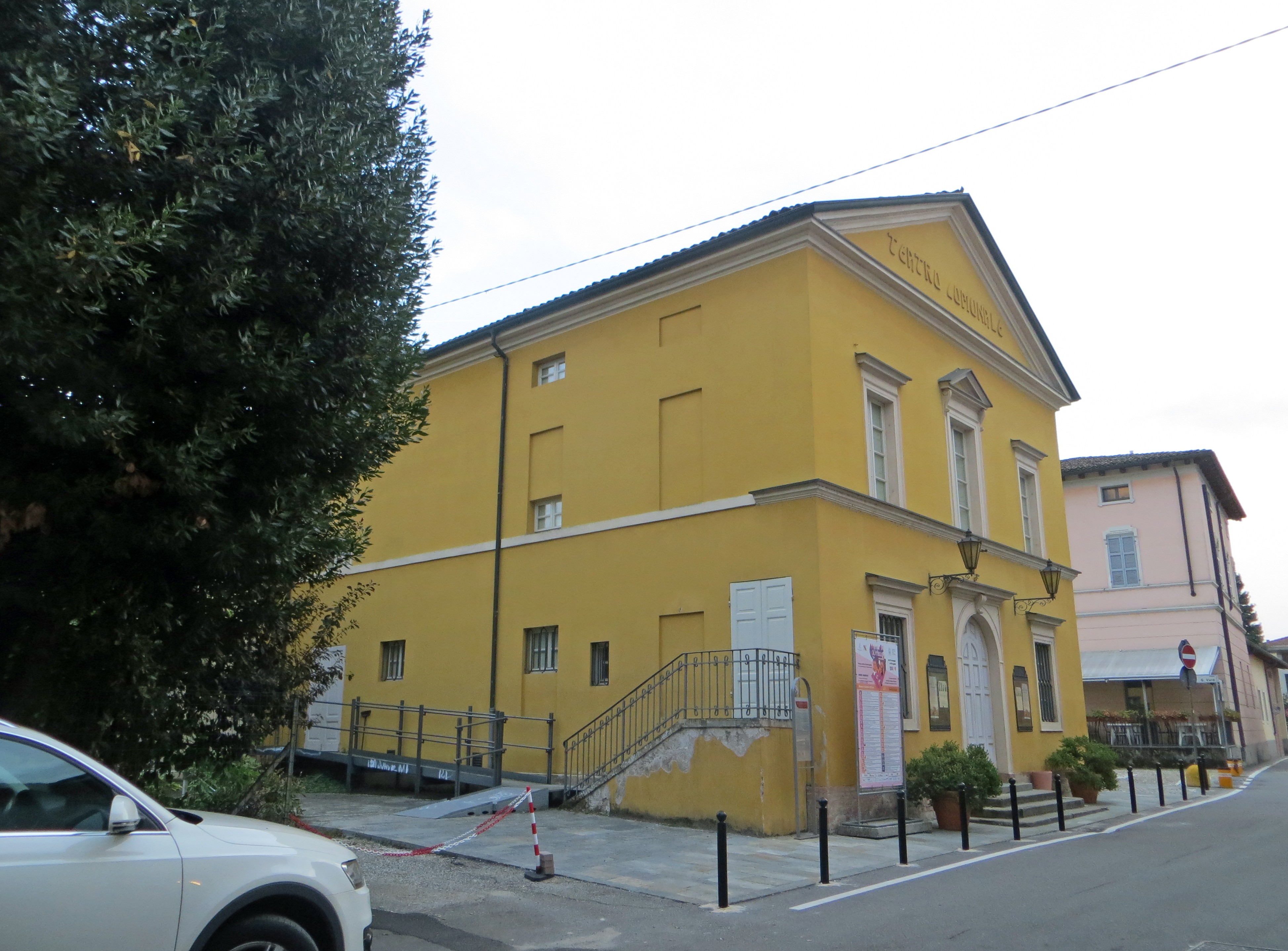 Teatro comunale (Fontanellato) - facciata e lato nord